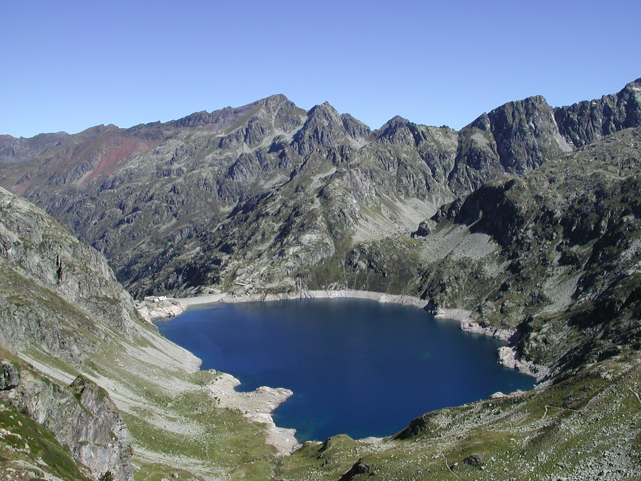 Lac d'Artouste